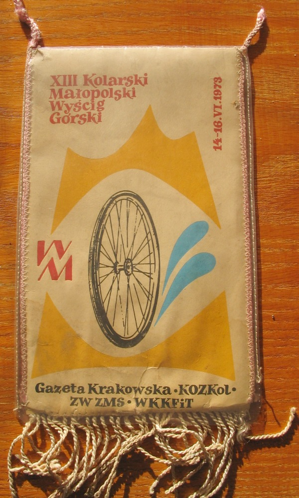 Proporczyk z XIII Małopolskiego Wyścigu Górskiego Autor: Piotr Tysarczyk